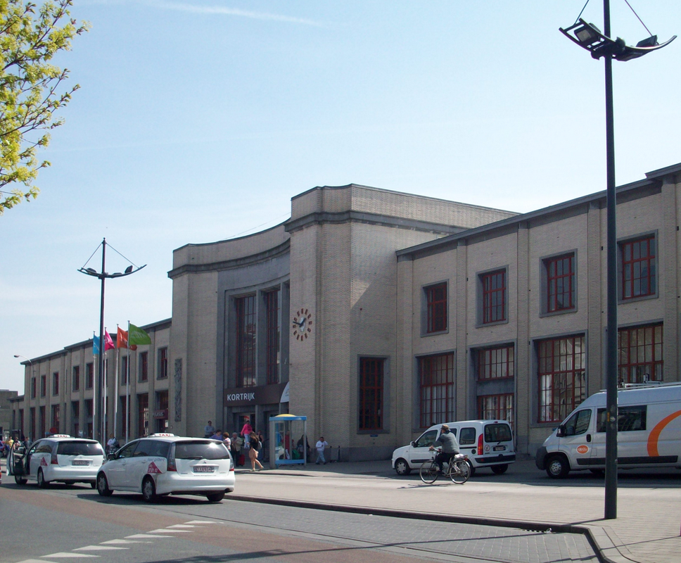 Station Kortrijk